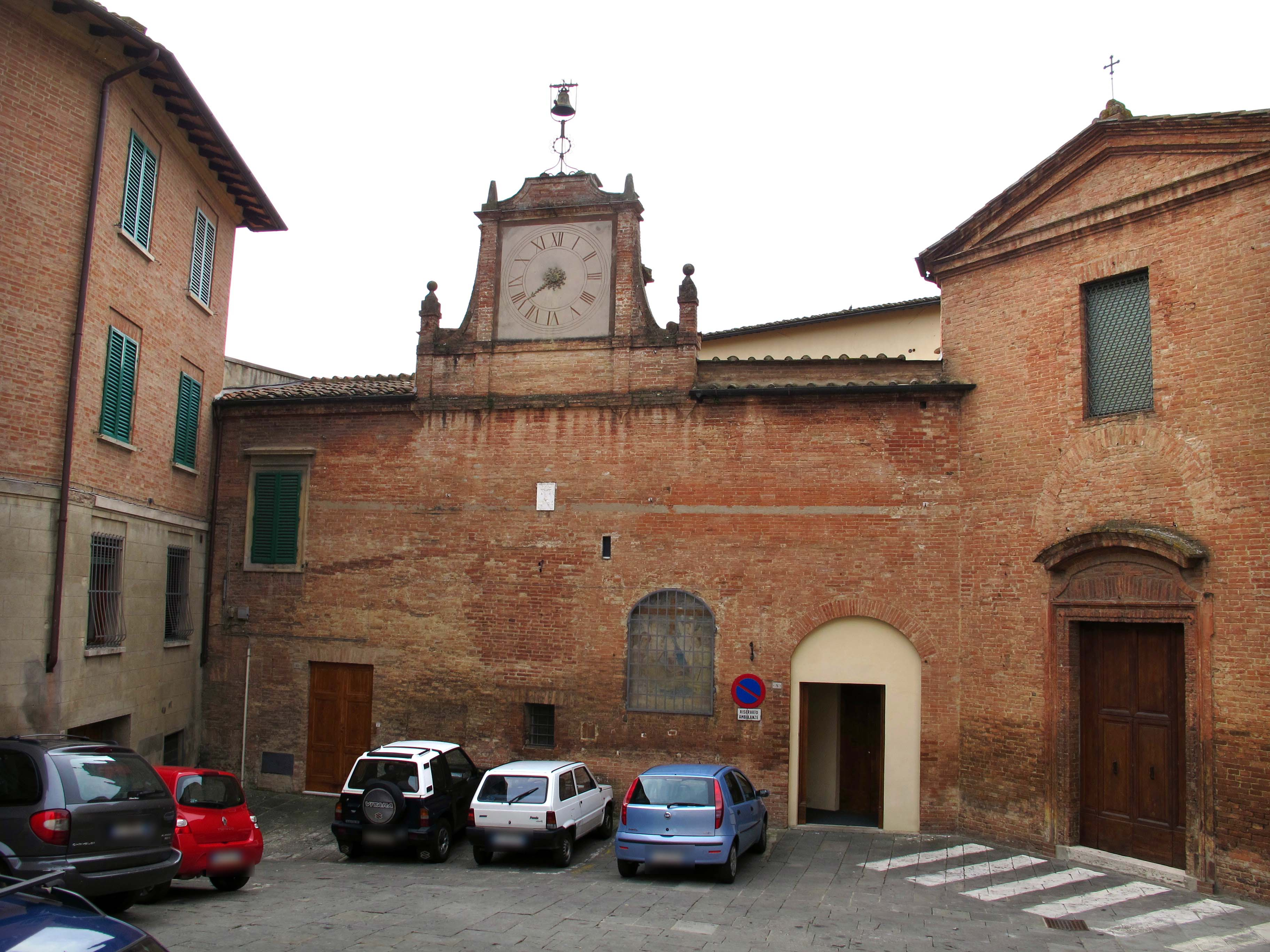 Via di Salicotto e dintorni, Siena